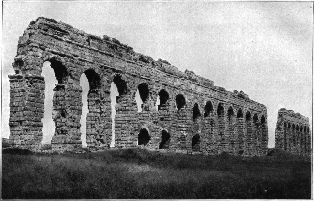 Fra den engelske wikipedia "Aqueduct" - "Aqua Claudia" aqueduct. From 1911 Encyc Brittanica.